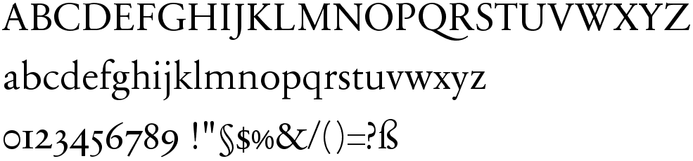 schriftartenmuster der sabon next